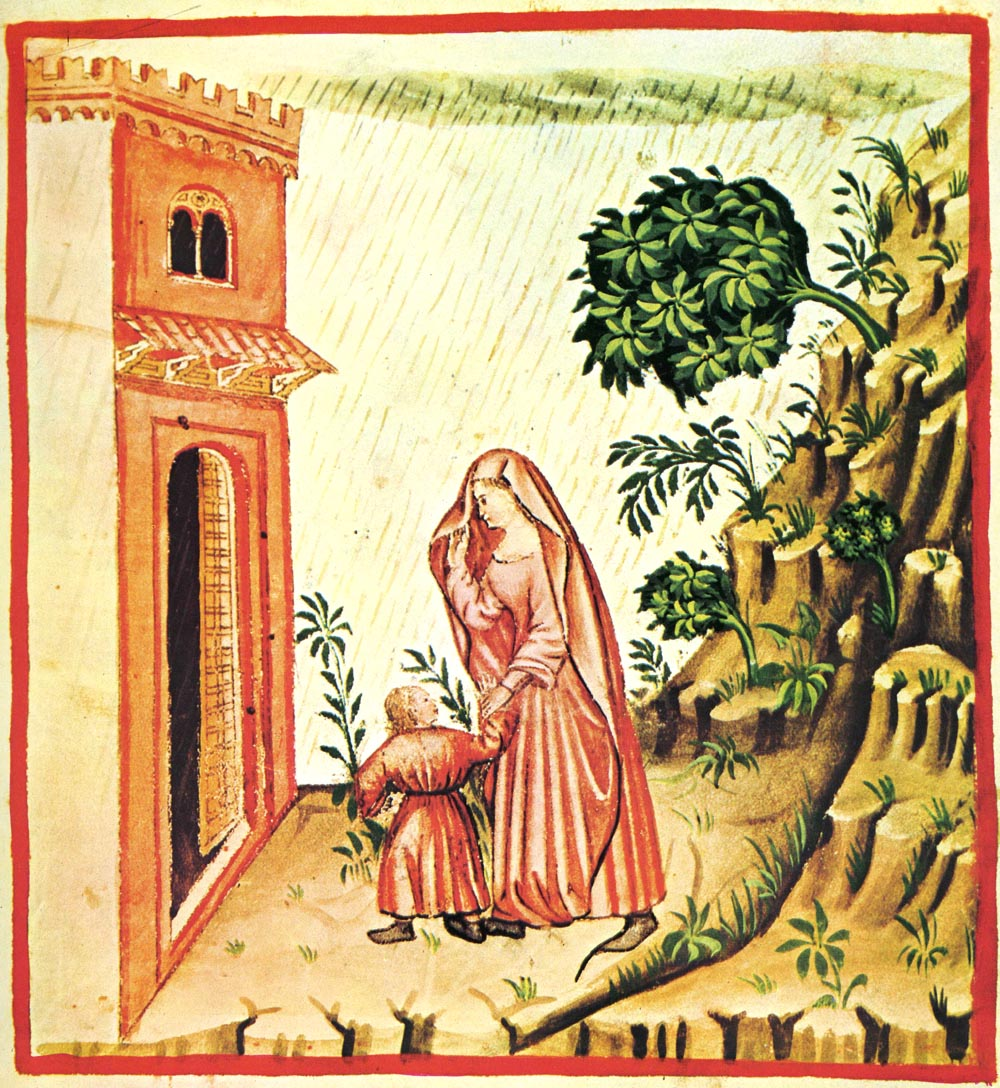 Tacuina sanitatis (XIV century) 2-vento meridionale, Taccuino Sanitatis, Casanatense 4182.